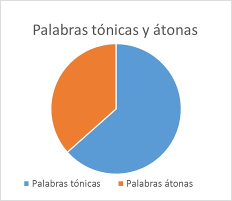 Información obtenida de: “Las unidades prosódicas o suprasegmentales: el acento” en Quilis, A. (2008): El comentario fonológico y fonético de textos. Teoría y práctica, 3ª ed., Madrid, Arco Libros.